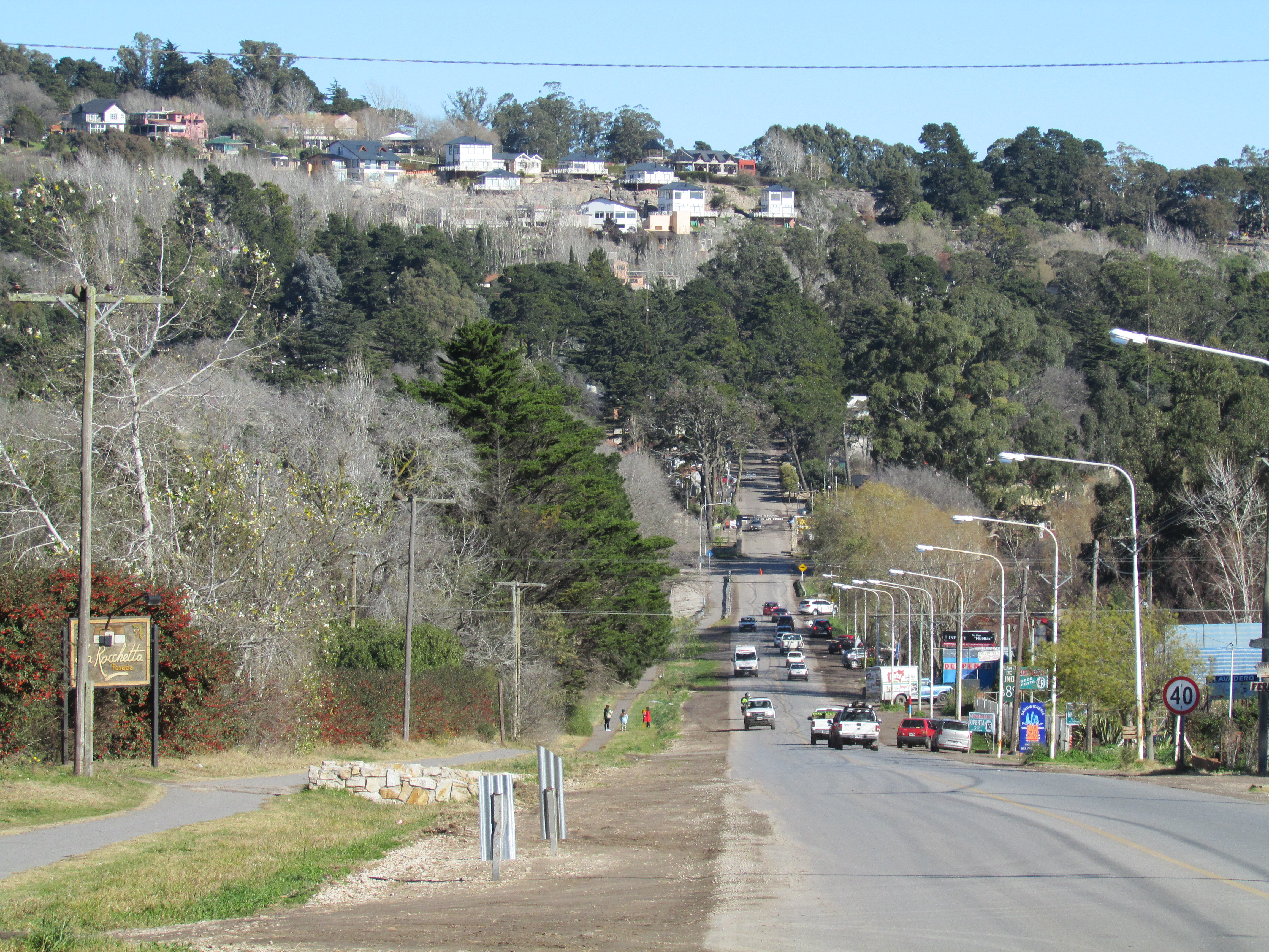 Camino de acceso a Sierra de los Padres, partido de General Pueyrredón, provincia de Buenos Aires, Argentina.